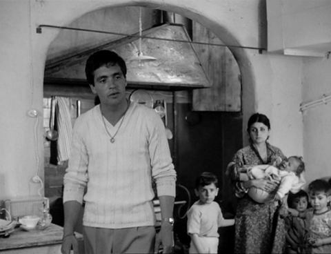 Accattone